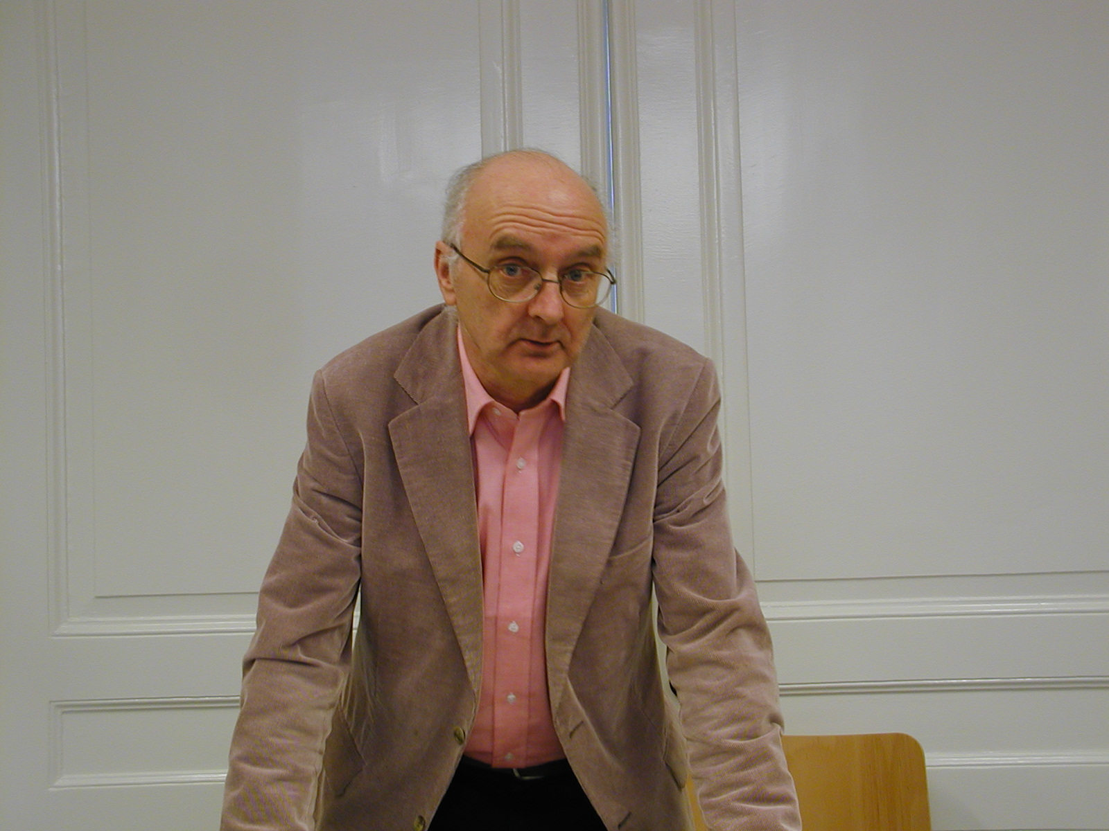 Fotis Yves Nevelsteen dum simpozio en la Internacia Esperanto-Instituto en Hago la 3-an de februaro 2007